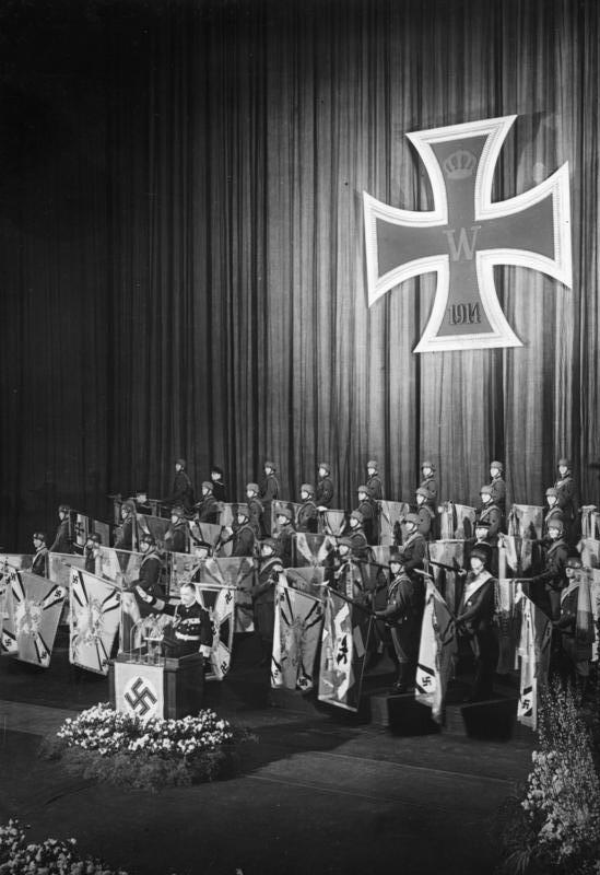 Berlin, Heldengedenktag, Erich Raeder Der Heldengedenktag des Grossdeutschen Reiches. Zum ersten Mal beging am Sonntag Grossdeutschland seinen Heldengedenktag, der mit den Jahrestagen der Wehrhaftmachung und der Heimkehr der Ostmark zusammenfiel. Im Mittelpunkt der Ereignisse stand der grosse Staatsakt in Berlin. U.B.z.: Das Senken der Fahnen nach der Rede des Generaladmirals Dr. h.c. [Erich] Raeder. Scherl Bilderdienst, Berlin 12.3.1939 [Herausgabedatum] Abgebildete Personen: Raeder, Erich: Großadmiral, Oberbefehlshaber der Kriegsmarine, Deutschland (GND 118743511)